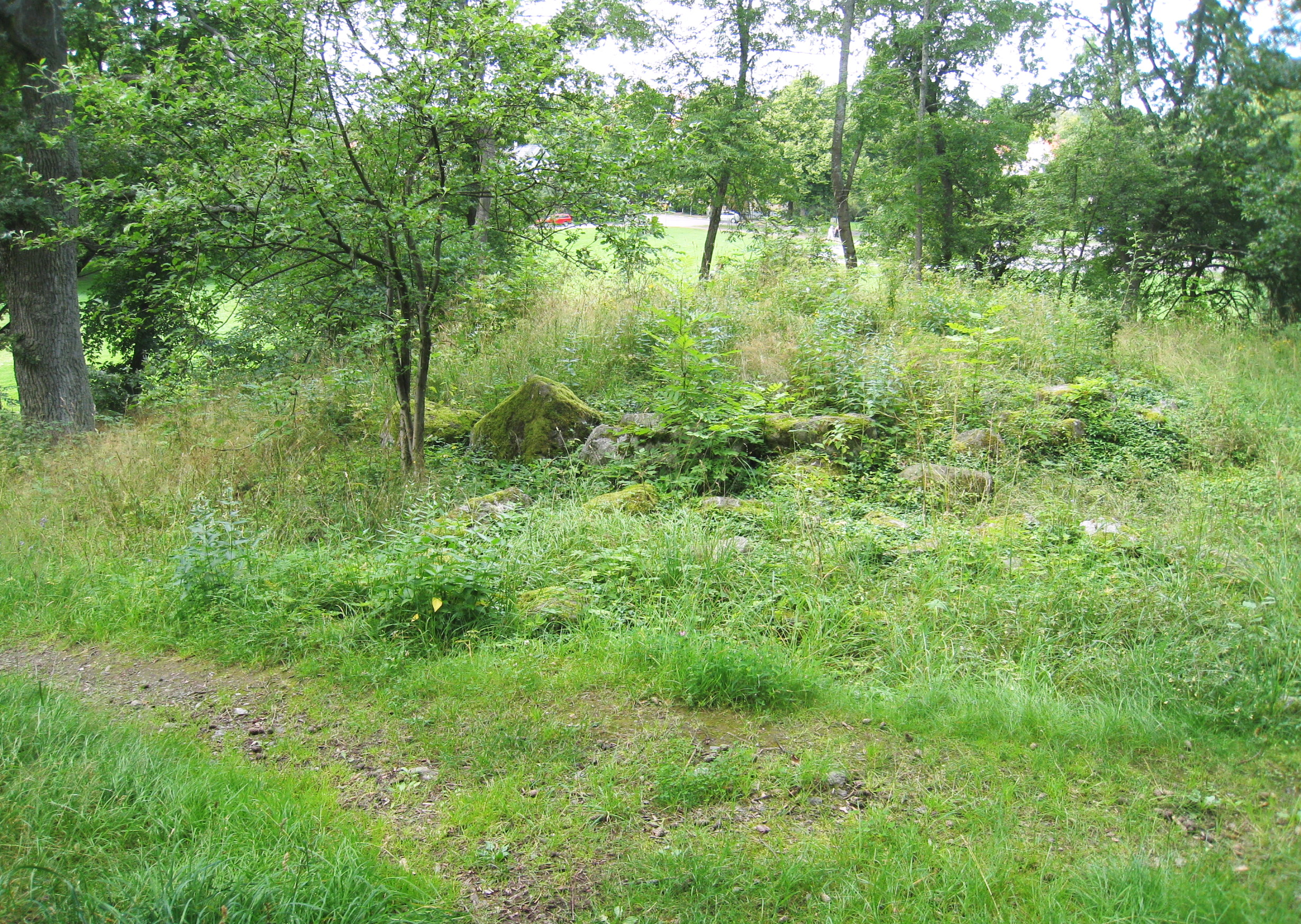 Vikingatida gravfält beläget vid östra sidan av Ålstensängen i södra Bromma väster om Stockholm. Gravfältet är från yngre järnåldern (550-1050 e.Kr.). Gravfältet består av 4 runda och 3 rektangulära stensättningar.